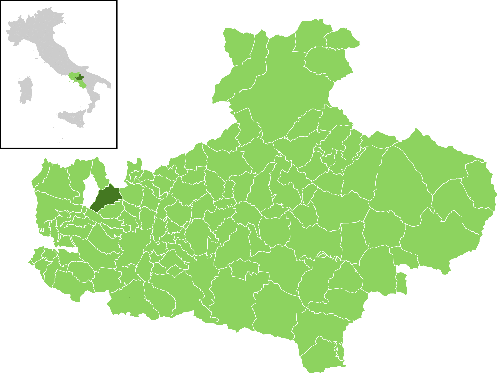 Posizione del comune all'interno della provincia di Avellino